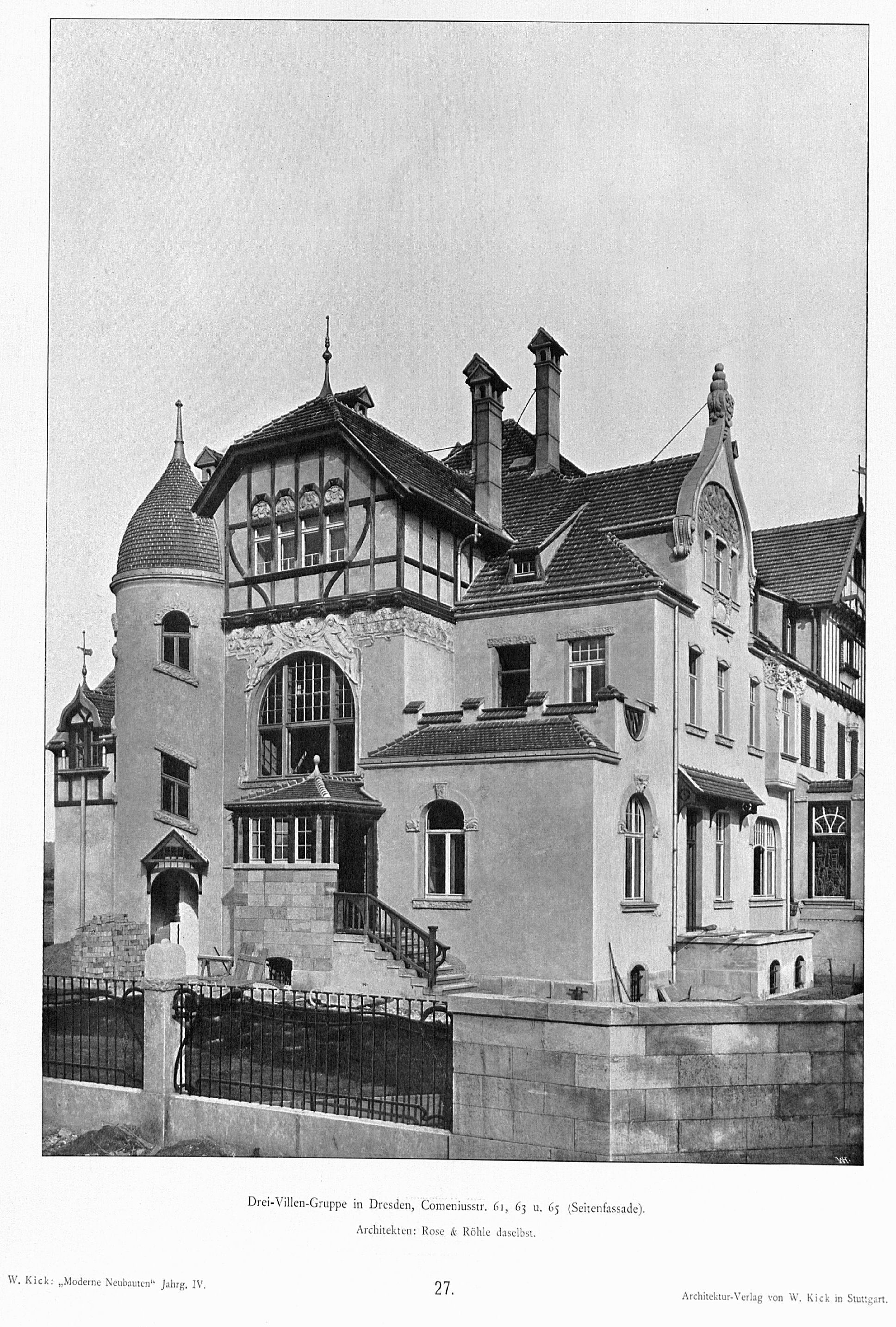 Drei-Villen-Gruppe Comeniusstraße 61, 63 und 65 in Dresden-Striesen; westliche Seitenansicht des Hauses Comeniusstraße 61 an der Einmündung der Henzestraße (im Zweiten Weltkrieg zerstört)